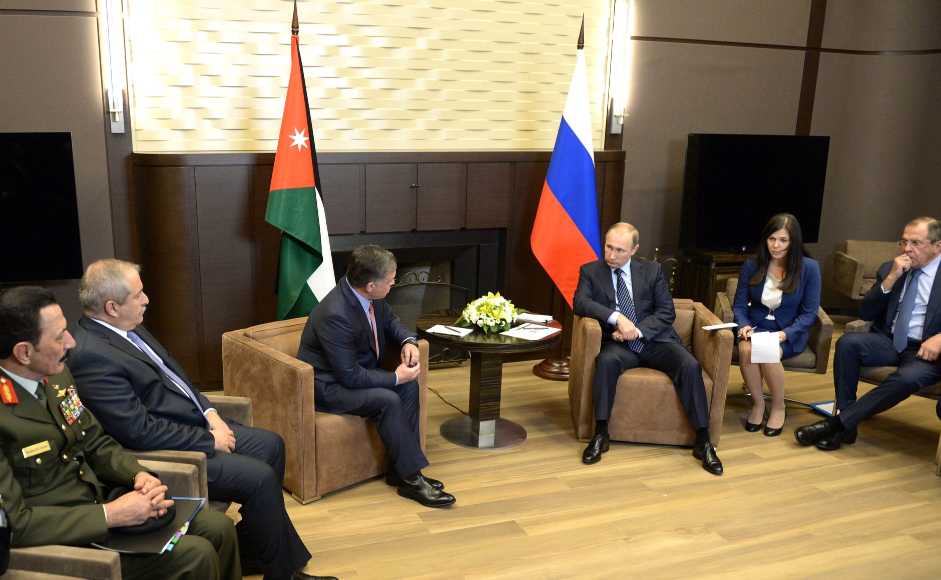 Встреча Президента России Владимира Путина с Королём Иордании Абдаллой II